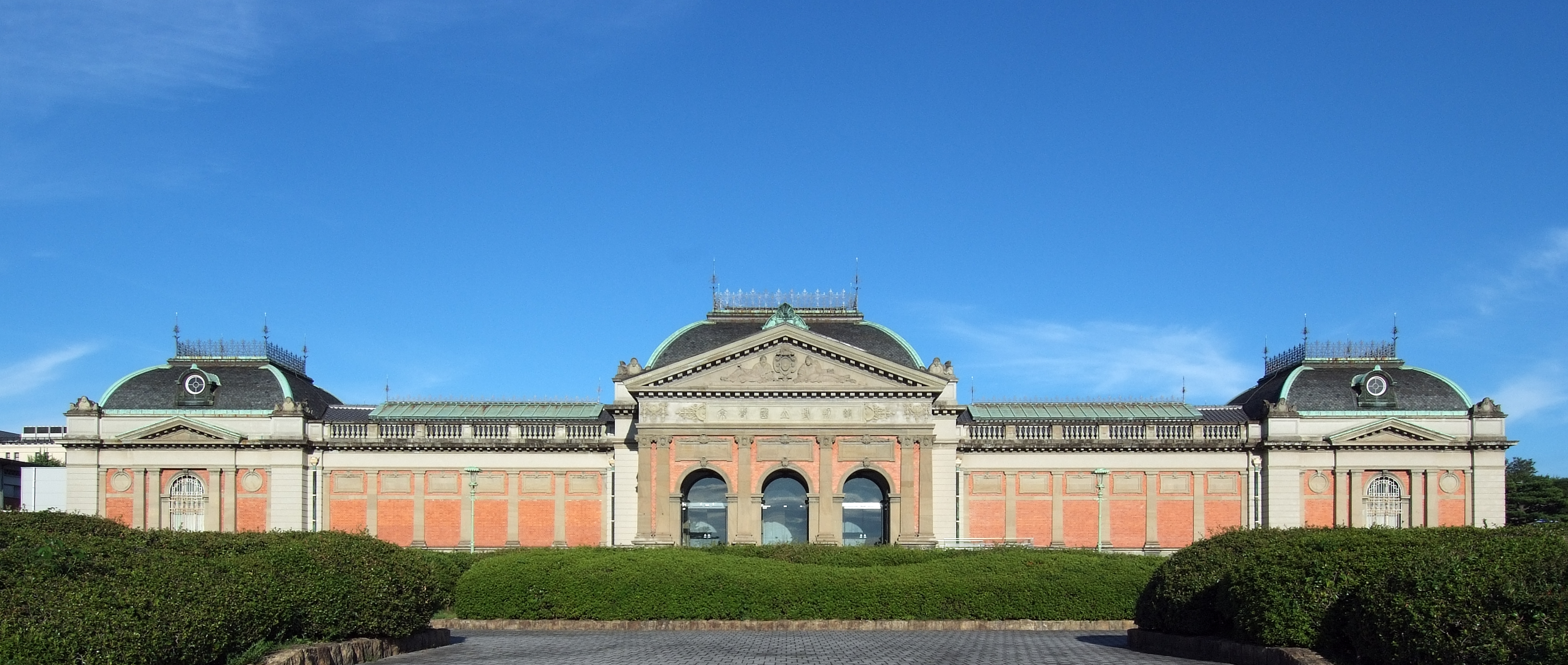 Kyoto National Museum, at kyoto Japan